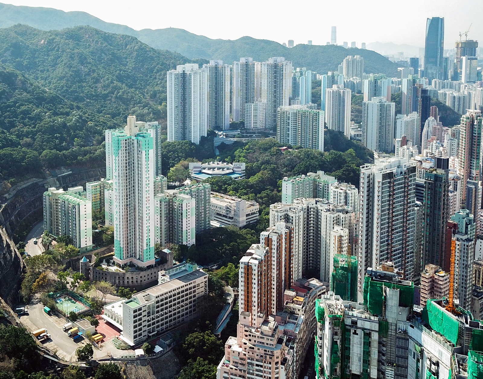 Tung Shing Court & Yiu Tung Estate